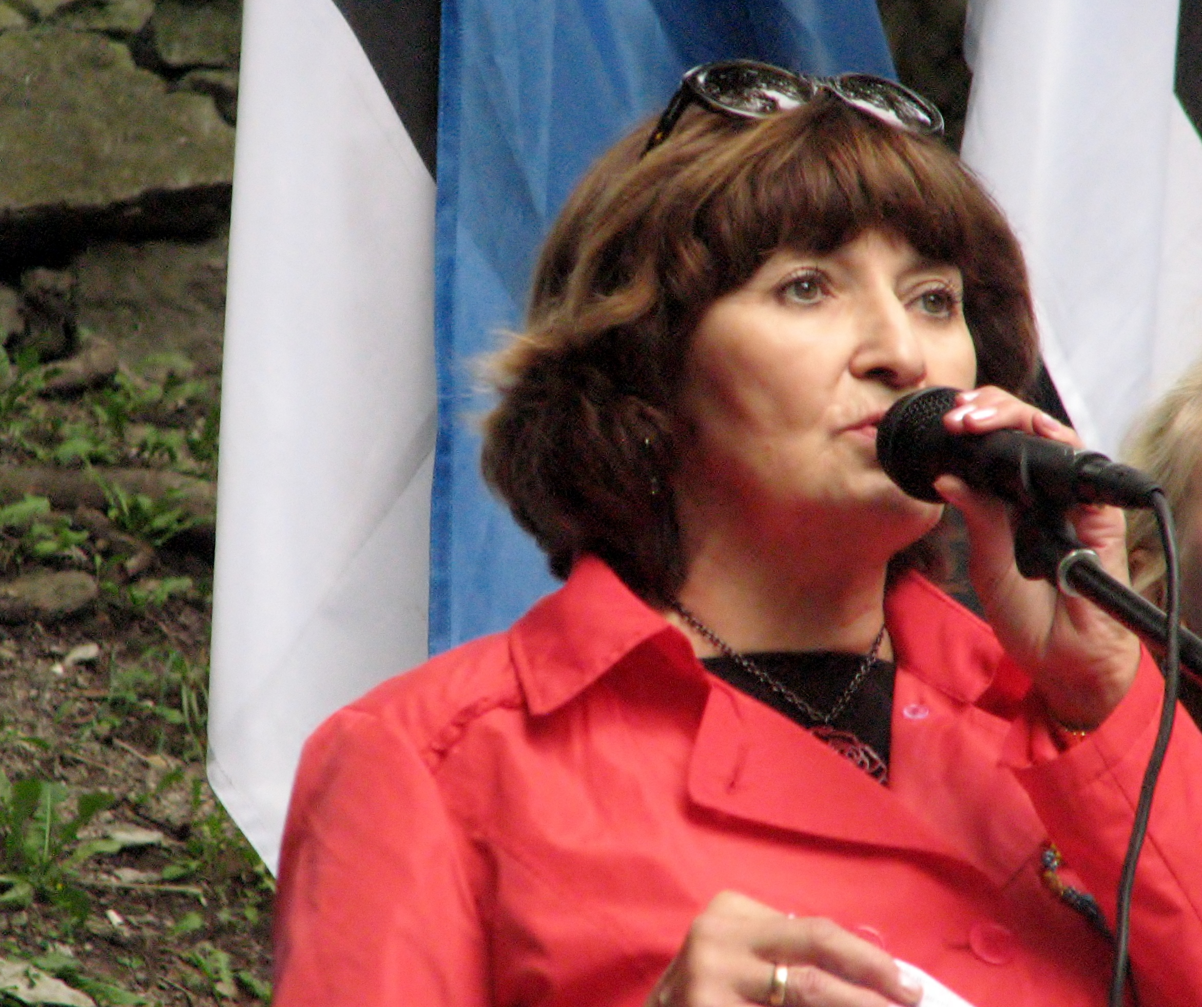 Vira Konõk Hirvepargi kõnekoosolekul